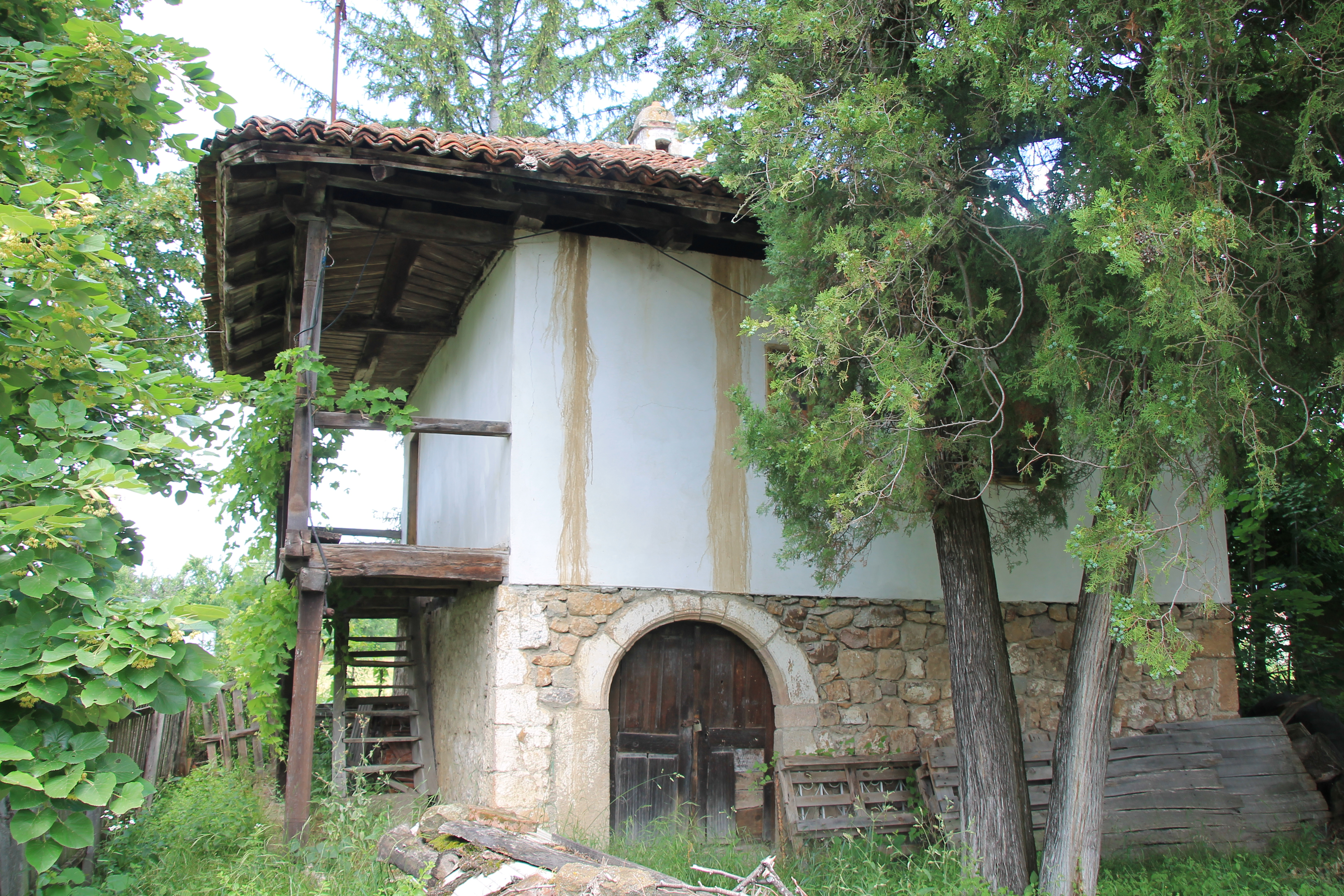 Bojovića kuća